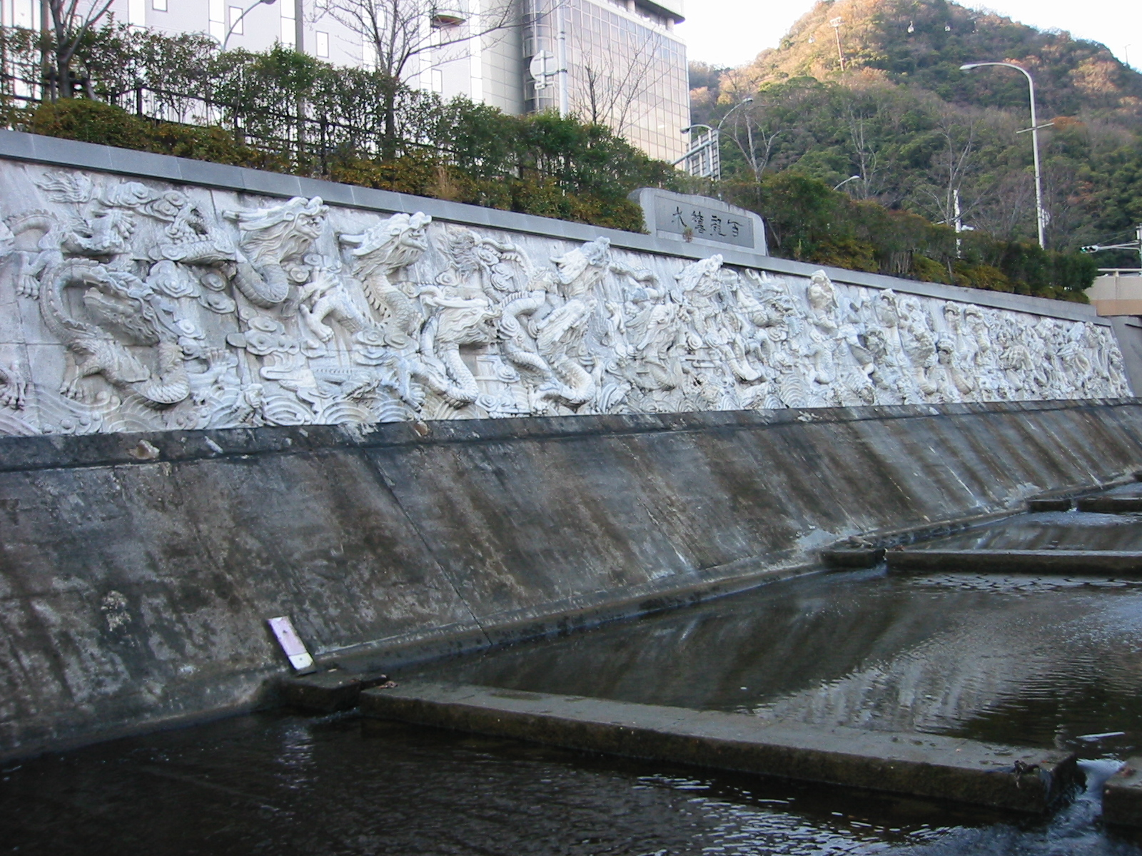 神戸 生田川 百龍嬉水(ひゃくりゅうきすい)